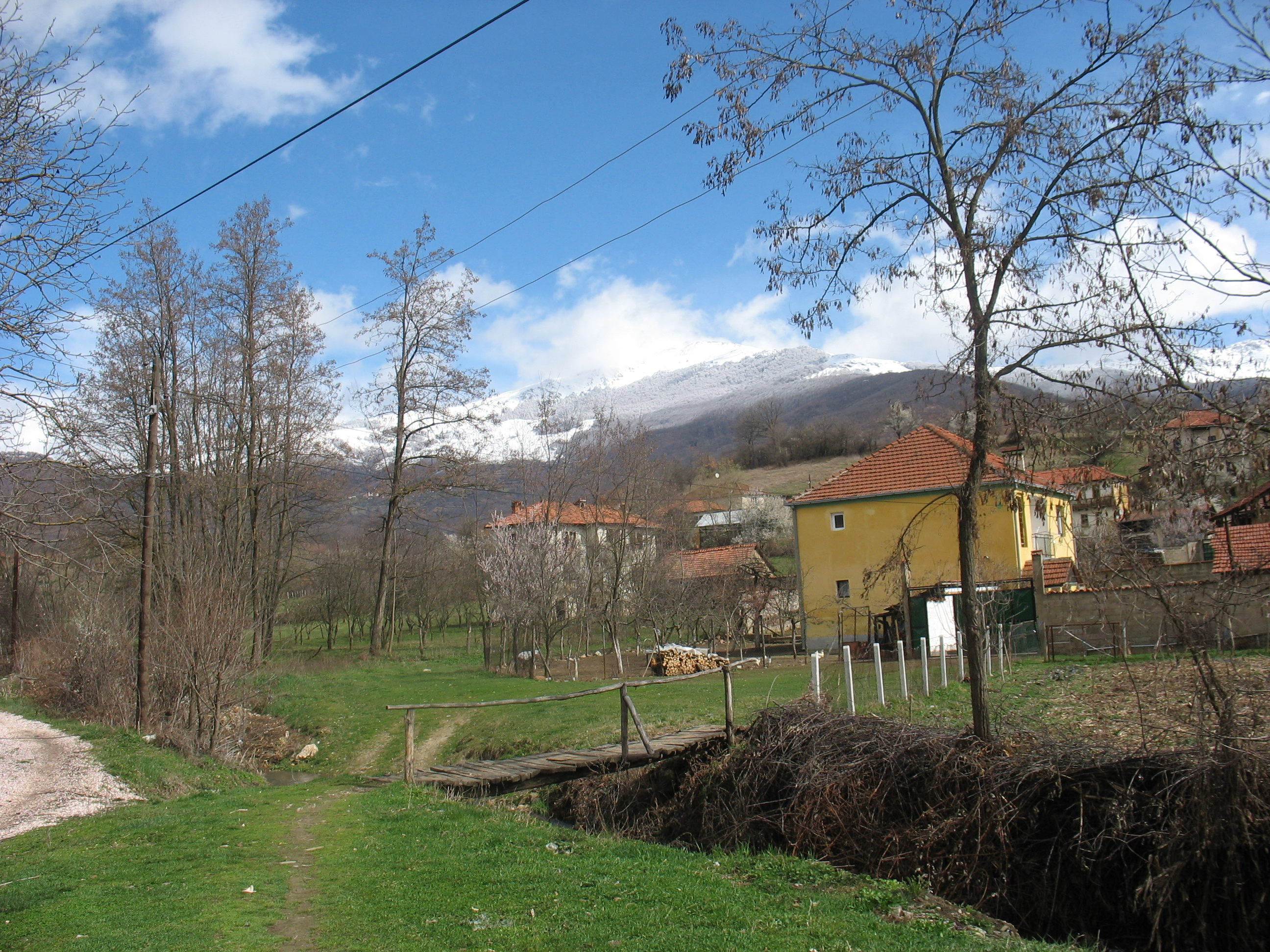 Поповјани, кичевско